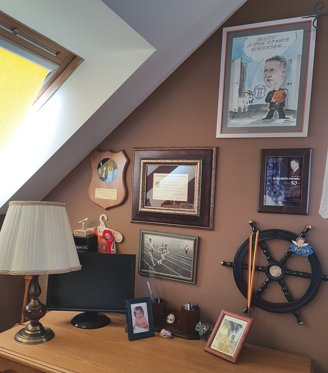 Pamiątki Koziorowicza, 2018